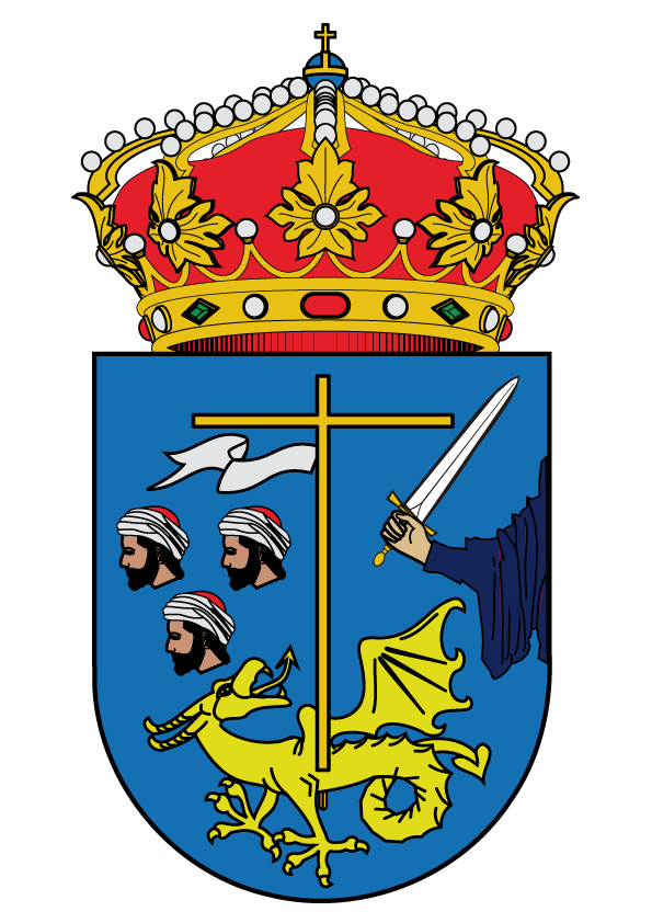 Escudo de San Millan de la Cogolla